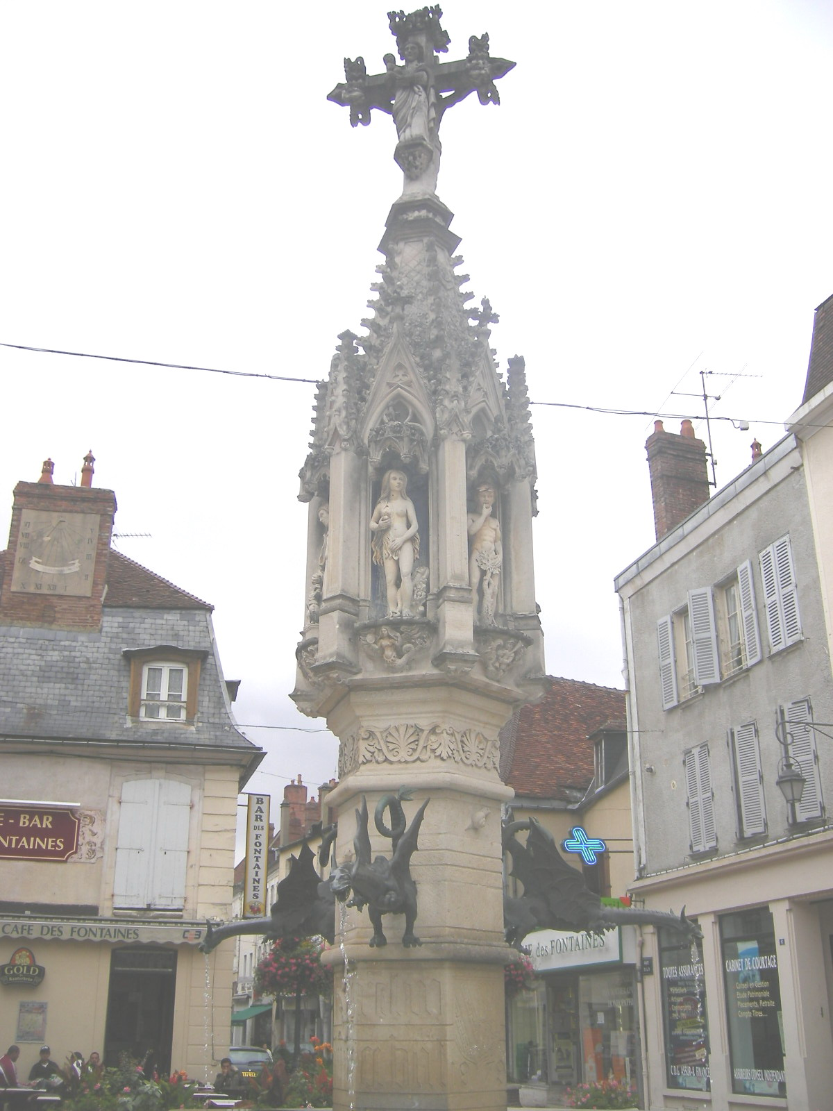 Saint-Florentin (Yonne). La fontaine aux dragons.